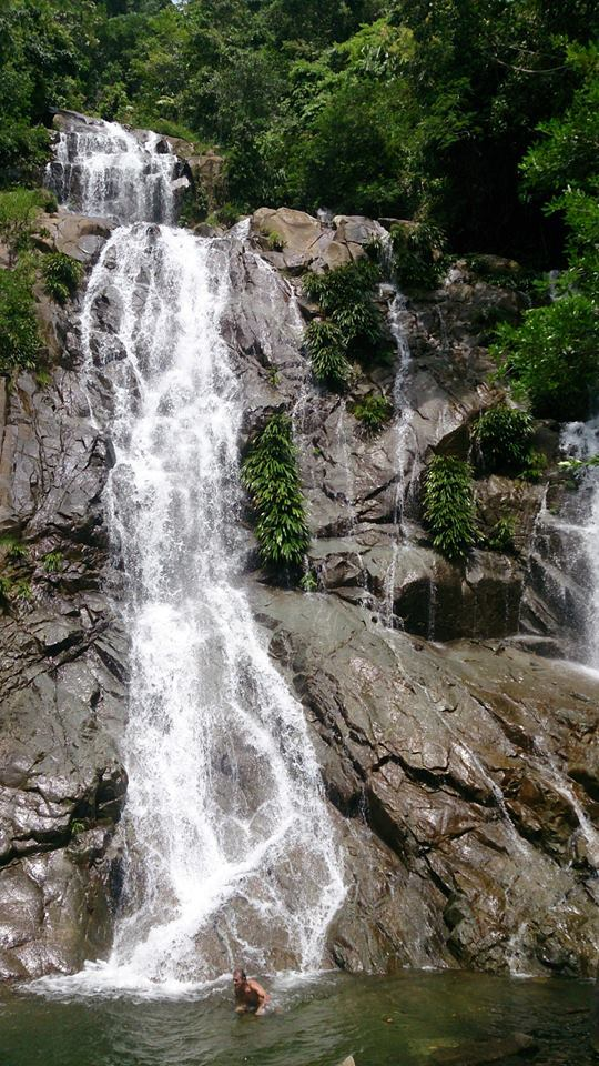 Esta fotografía fue tomada en el municipio colombiano con código 05660.